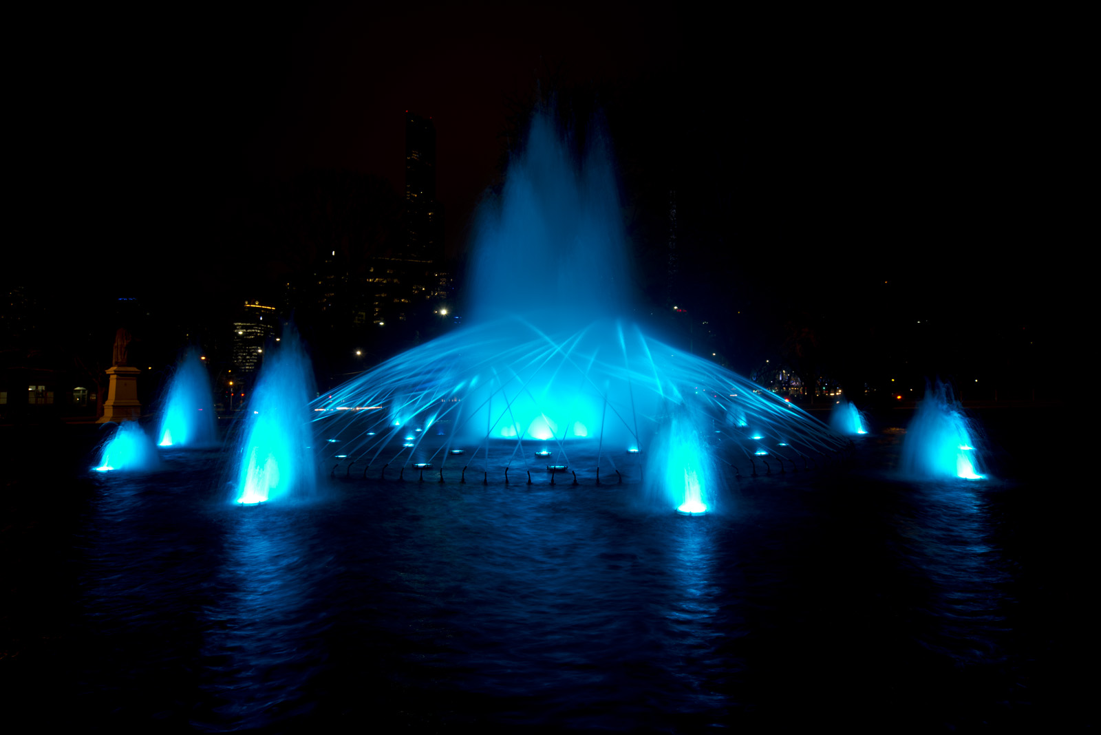 Fountain